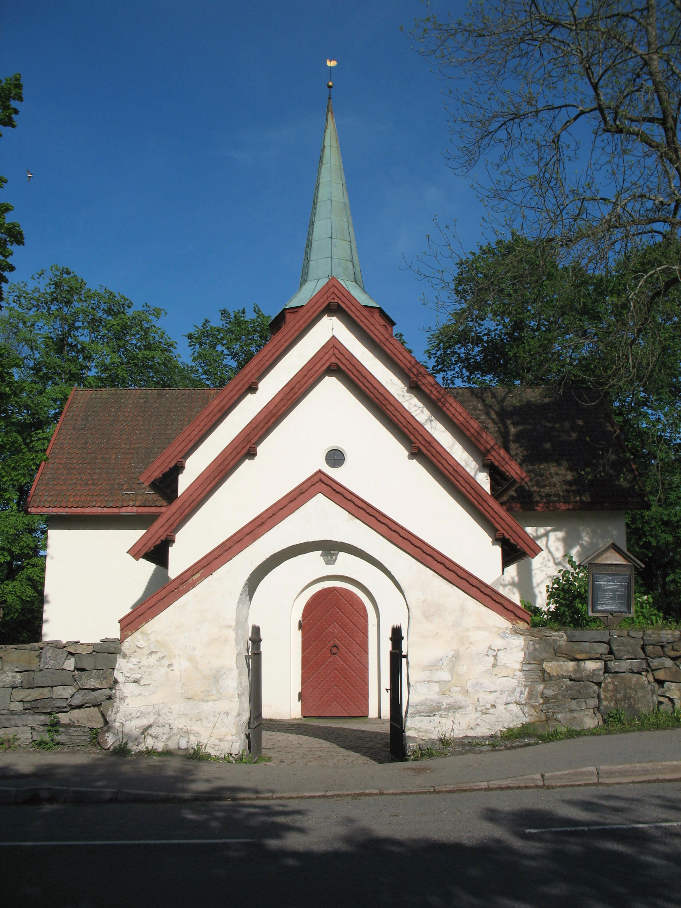 Haslum kirke er en korskirke fra ca. 1190 i Bærum